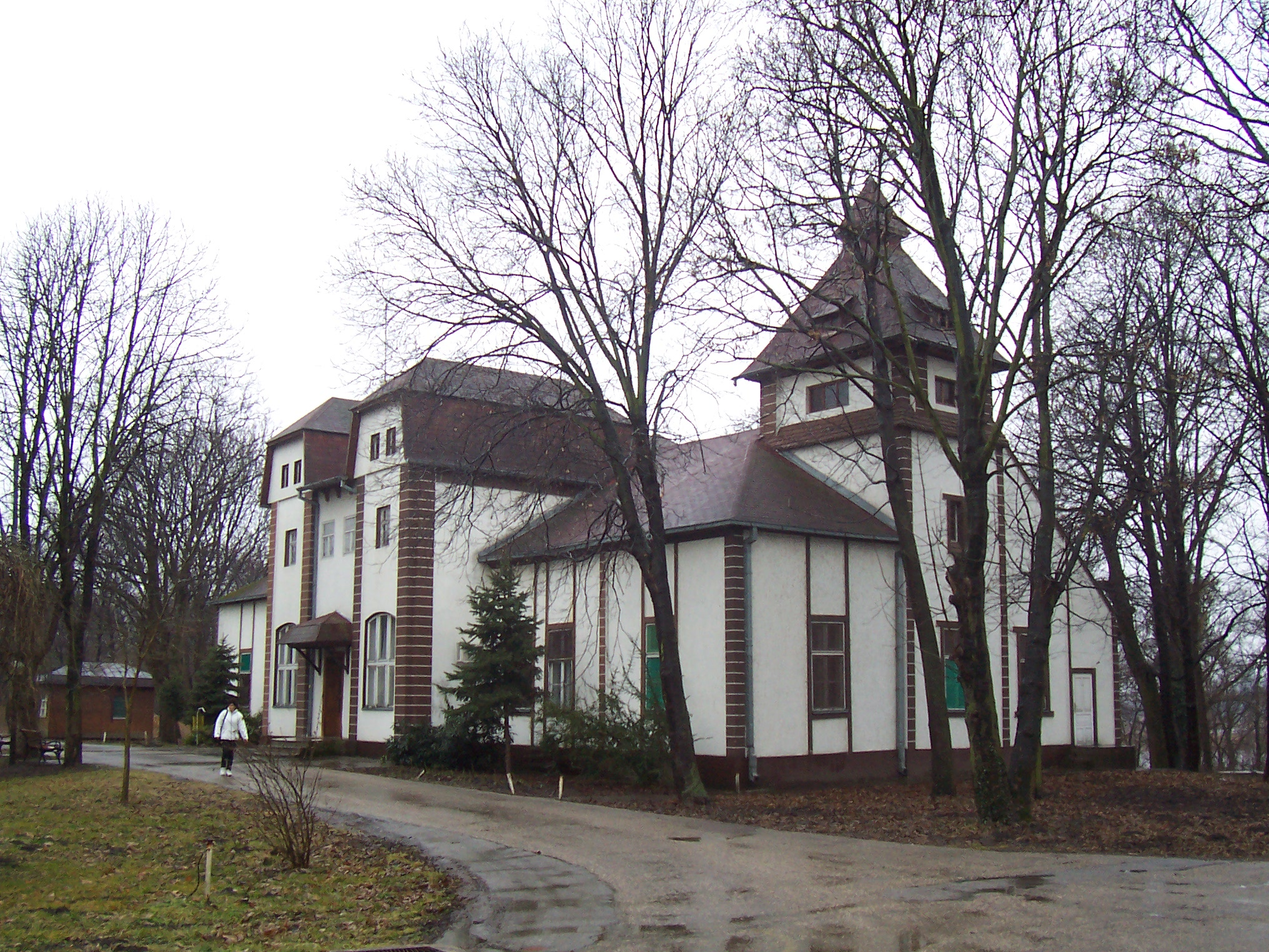 Zobnatica kaštel (now a hotel)